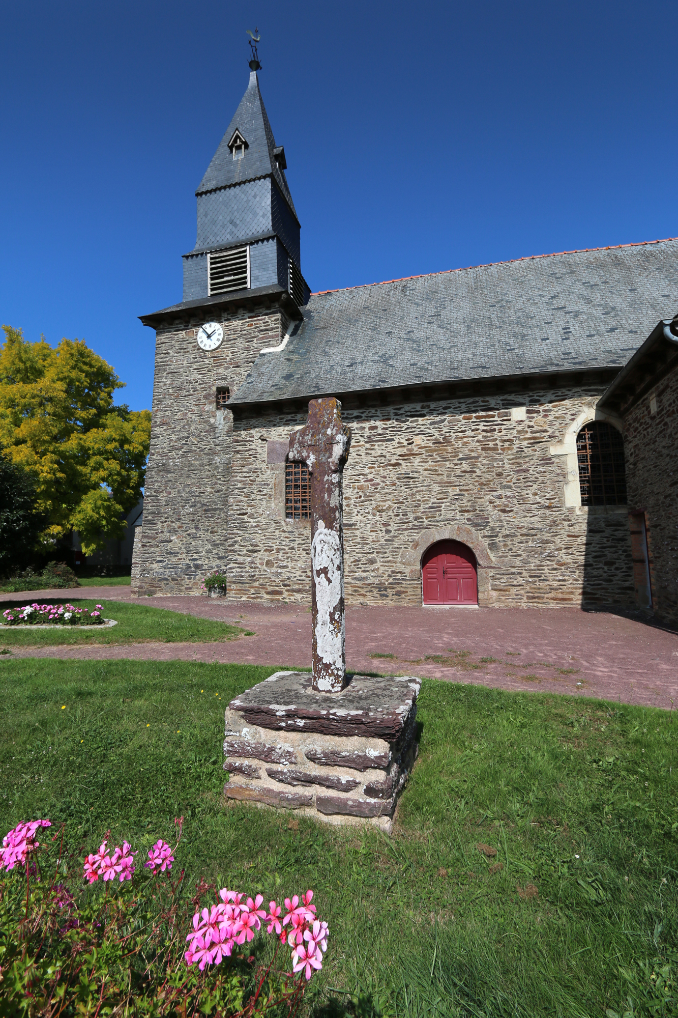 Le croix de l'église St-pierre du Verger